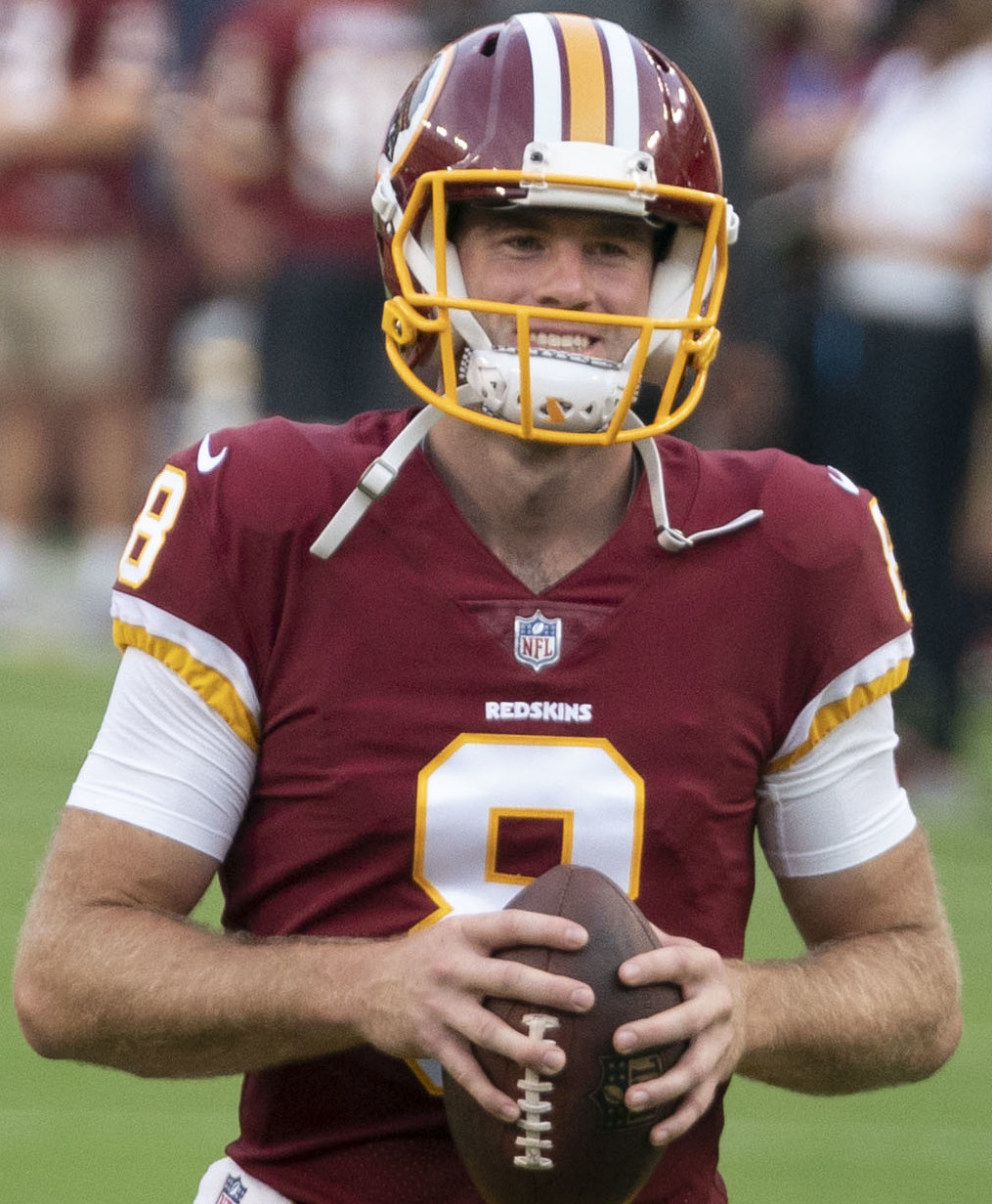 Jets at Redskins 8/16/18